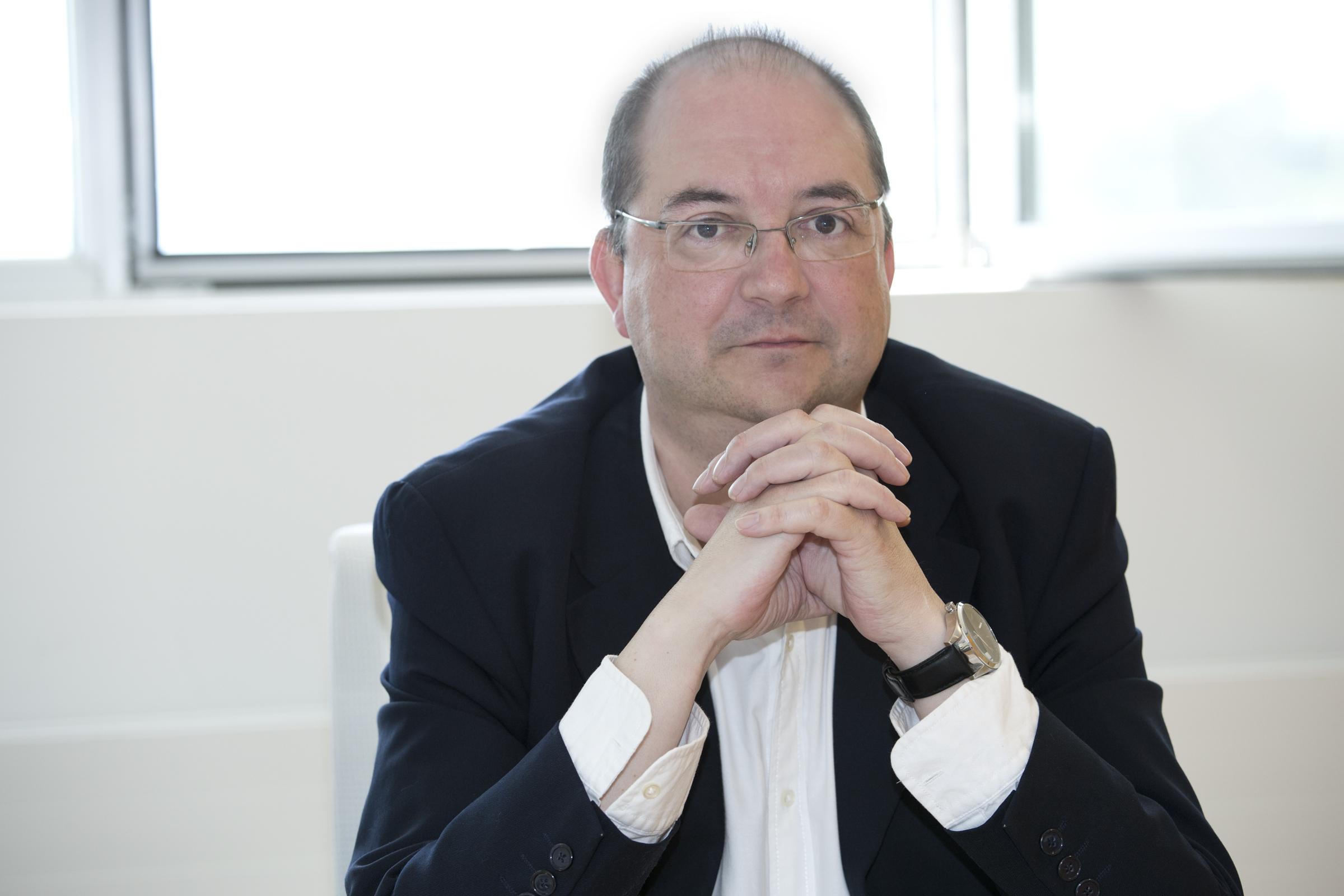 Retrato del autor al que se refiere esta entrada